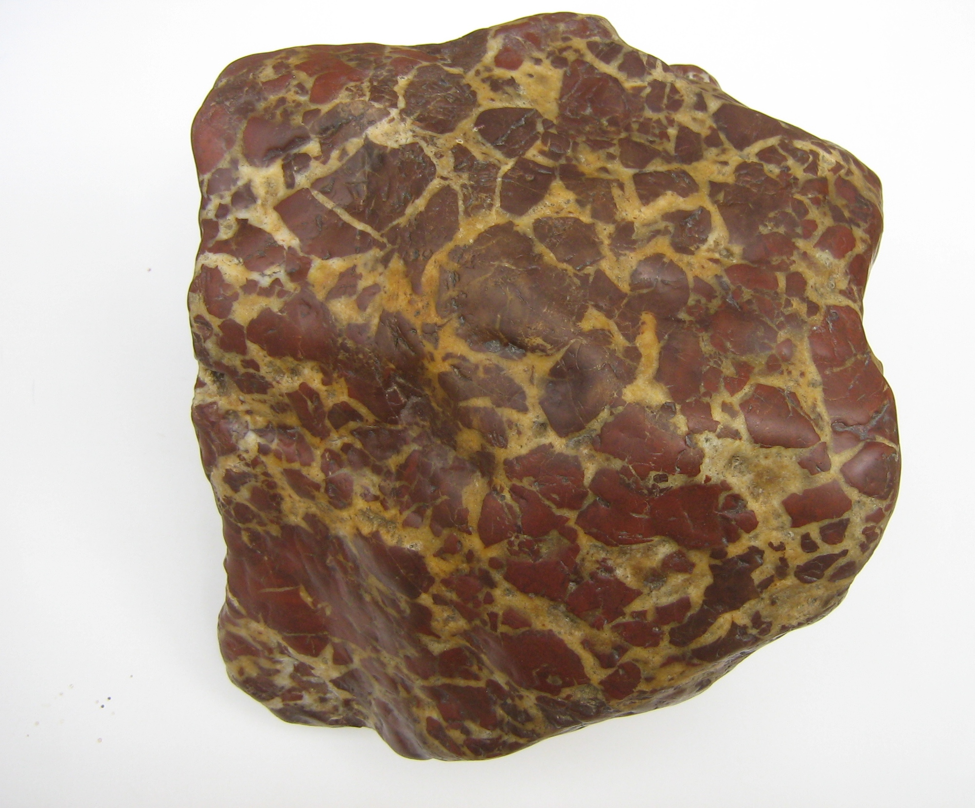 Kellerwalder Achat, Durchmesser ca. 21 cm